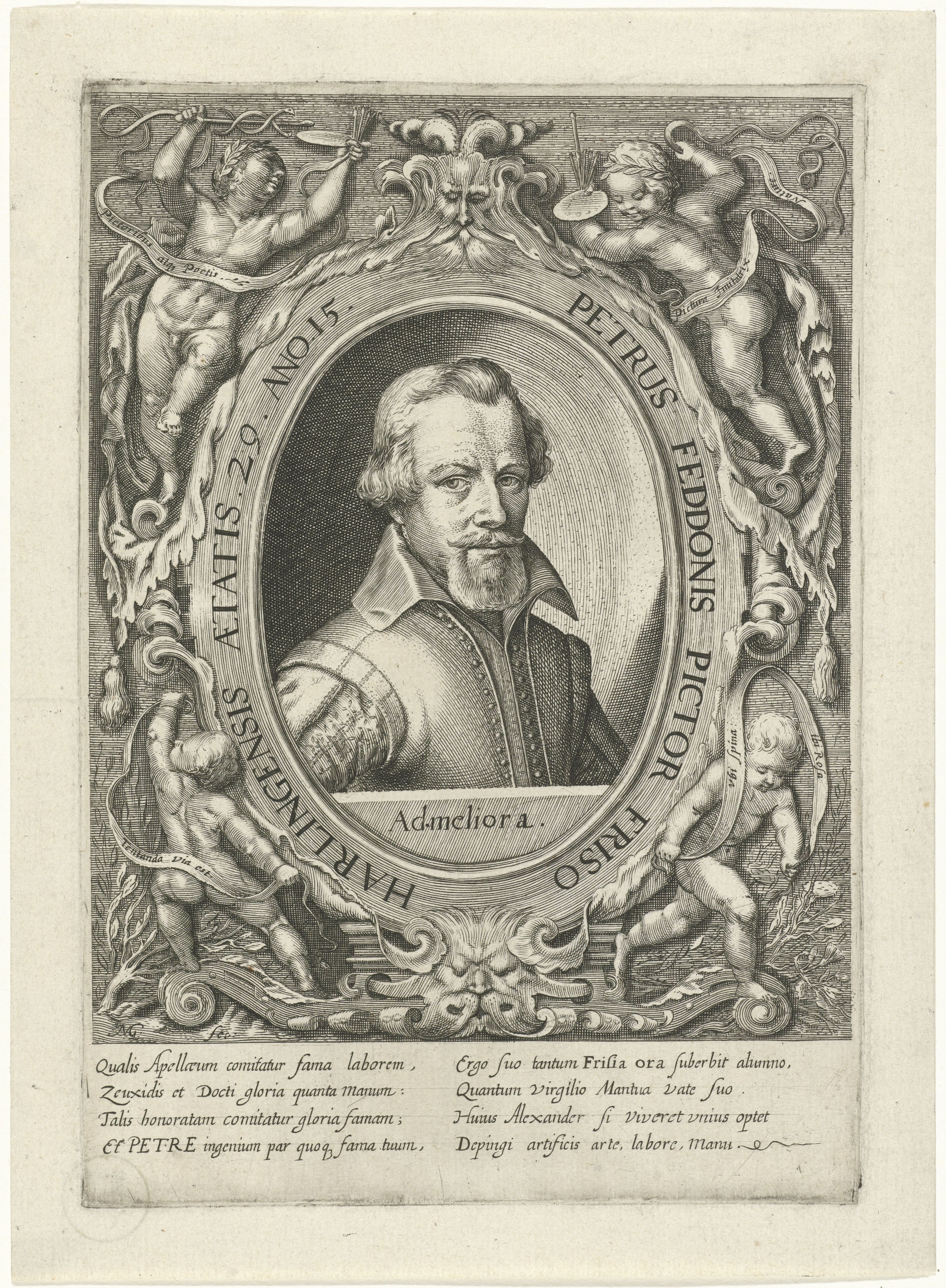 IdentificatieTitel(s): Portret van Pieter Feddes van HarlingenObjecttype: prent Objectnummer: RP-P-1886-A-10434Catalogusreferentie: Hollstein Dutch 3Opschriften / Merken: verzamelaarsmerk, verso midden, gestempeld: Lugt 2228verzamelaarsmerk, verso rechtsonder, gestempeld: Lugt 514verzamelaarsmerk, verso rechtsonder, gestempeld: Lugt 2227Omschrijving: Portret in ovale lijst van Pieter Feddes van Harlingen, schilder, prentmaker en uitgever. Buste naar rechts. Rondom het portret vier putti. Twee van de putti hebben schilderspaletten in de hand. De prent heeft een Latijns onderschrift.VervaardigingVervaardiger: prentmaker: Nicolaes van Geelkercken (vermeld op object)schrijver: anoniemPlaats vervaardiging: LeidenDatering: 1615Fysieke kenmerken: gravureMateriaal: papier Techniek: graveren (drukprocedé)Afmetingen: plaatrand: b 146 mm × h 210 mmOnderwerpWat: portrait, self-portrait of paintercupids: 'amores', 'amoretti', 'putti'caduceus (staff with two snakes, attribute of Mercury)paletteWie: Pieter Feddes van HarlingenVerwerving en rechtenVerwerving: aankoop 20-apr-1886Copyright: Publiek domein